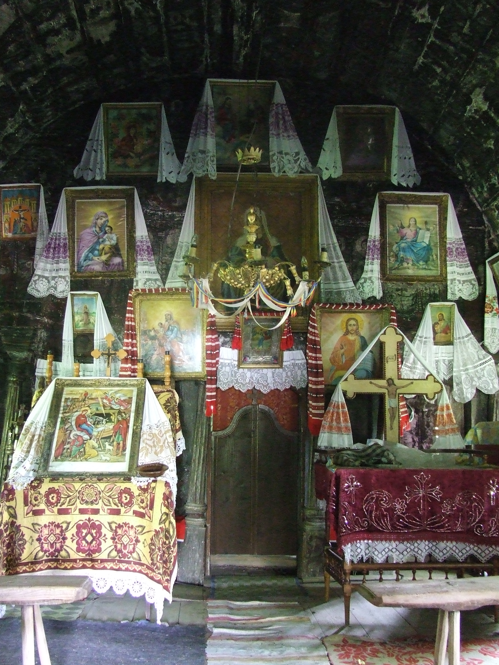 Biserica de lemn din Sânpaul. Iconostasul